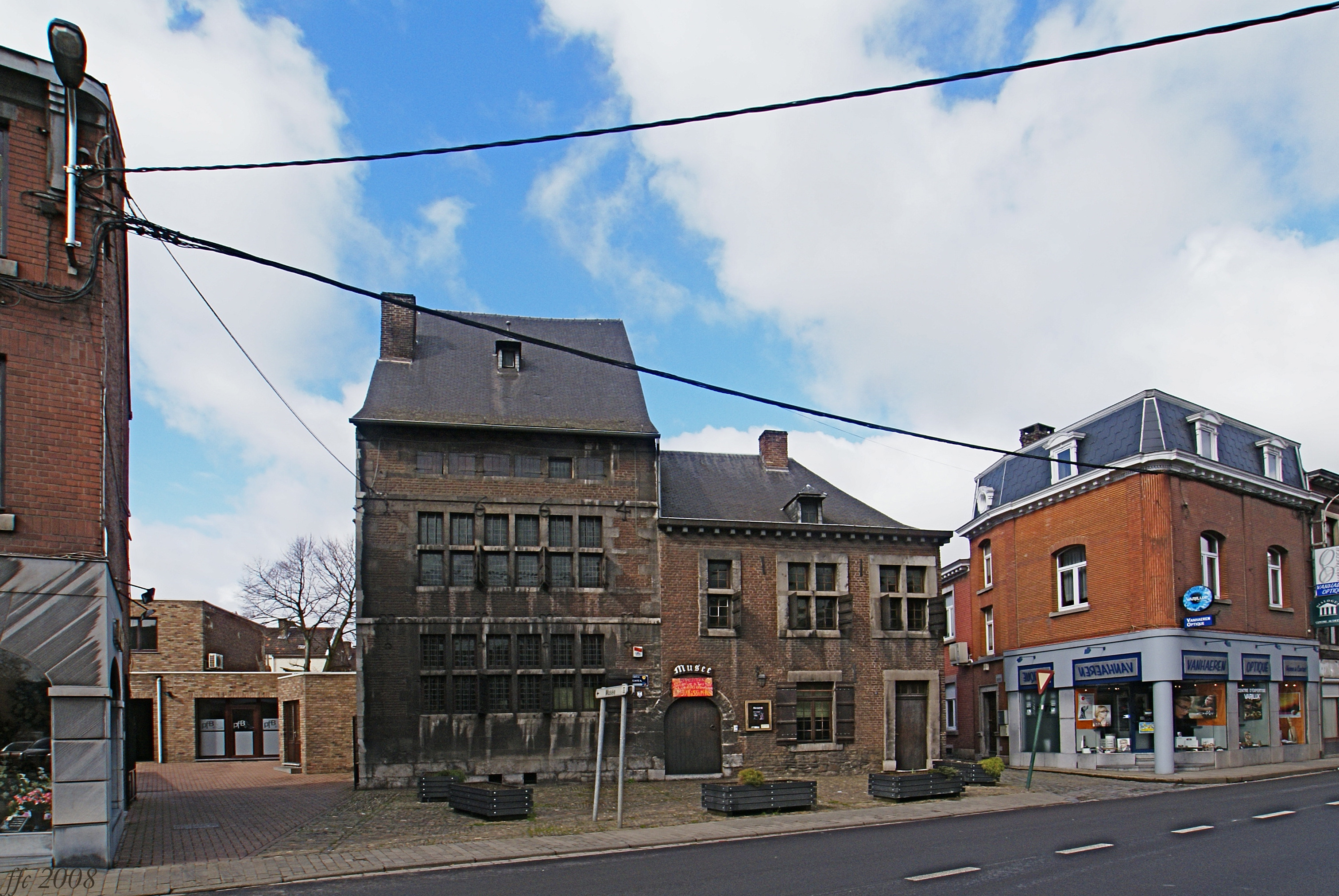 Herstal (Belgium) Museumde Lovinfosse House 1664 Museu municipal casa De Lovinfosse 1664 Musée Communal Hôtel de Lovinfosse 1664